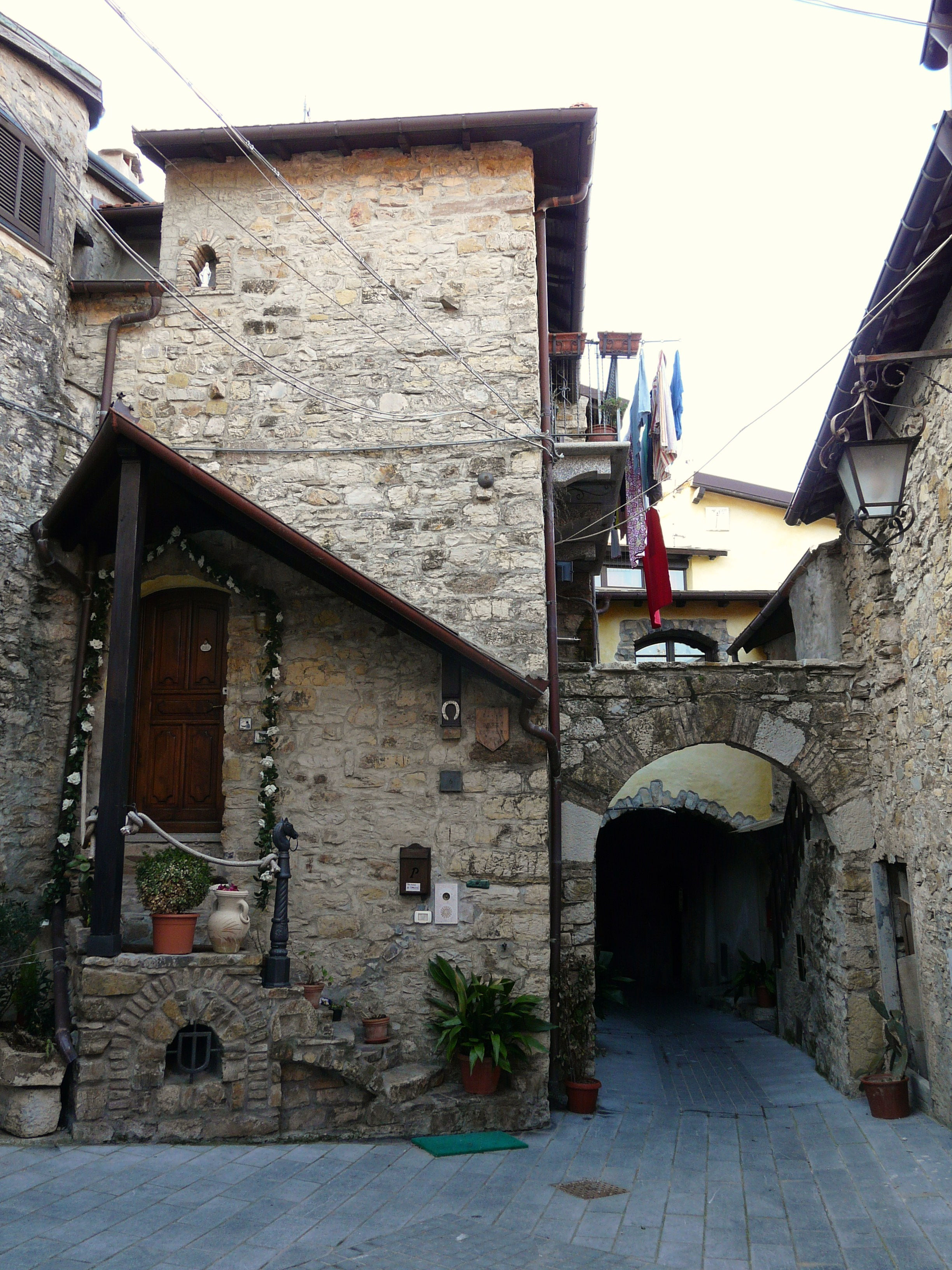 Centro storico della borgata Castello, Chiusanico, Liguria, Italia